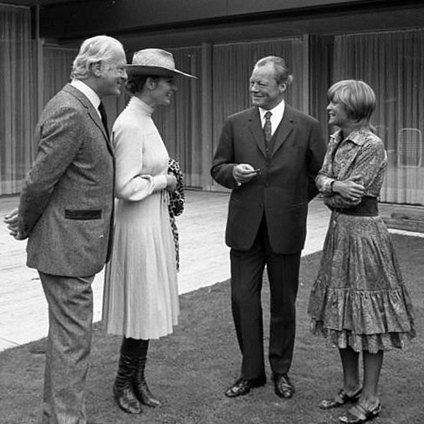 Bundeskanzler Willy Brandt empfängt Schauspieler im Bundeskanzlerbungalow in Bonn. Links Curd Jürgens mit Ehefrau Simone Jürgens, Mitte Willy Brandt, rechts Romy Schneider.